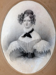 Ritratto di Costanza Trotti (1800-1871)